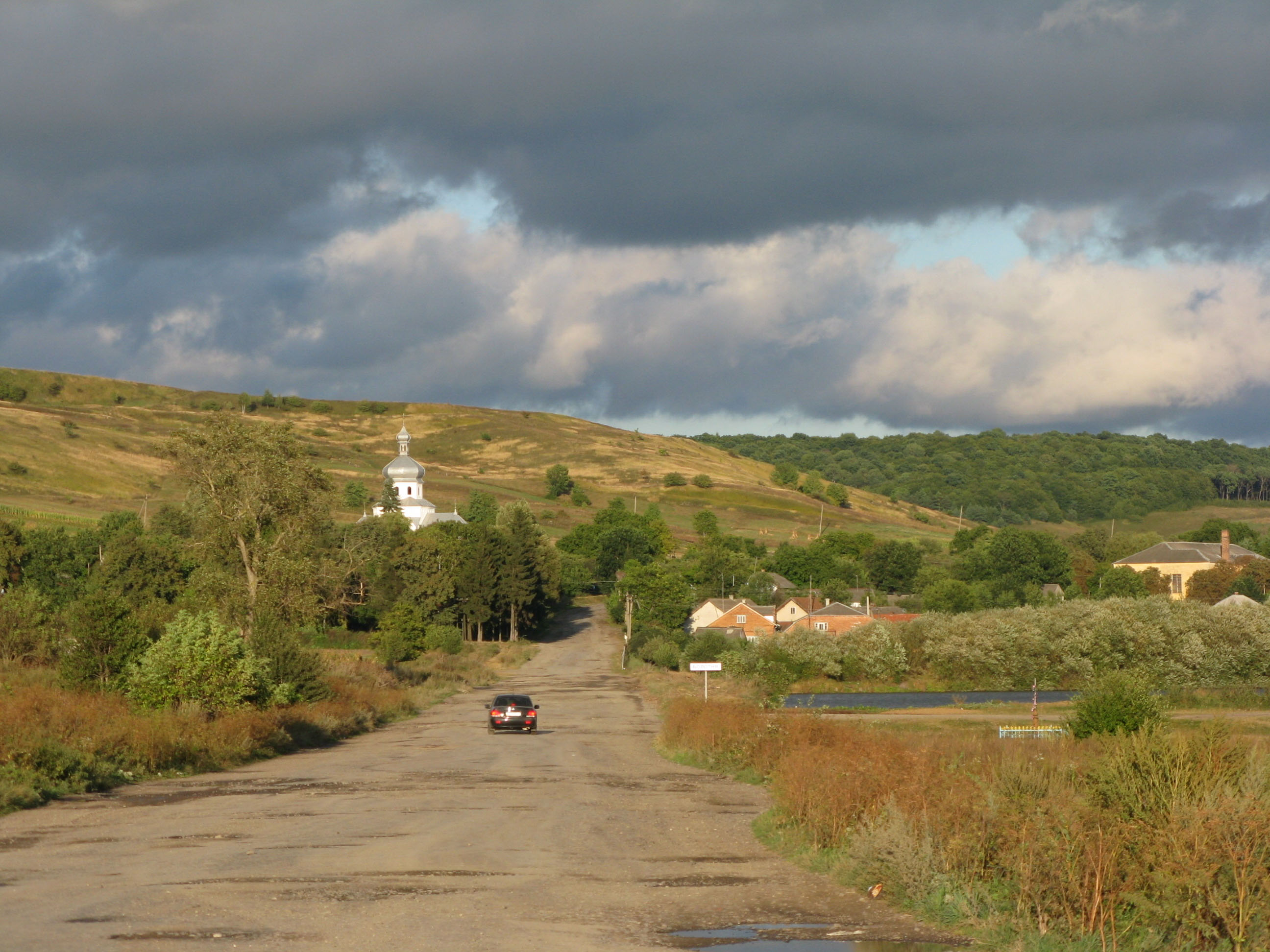 В'їзд в с. Болотню дорогою з Перемишлян.: зліва видніється церква села, справа - смужка ставу.